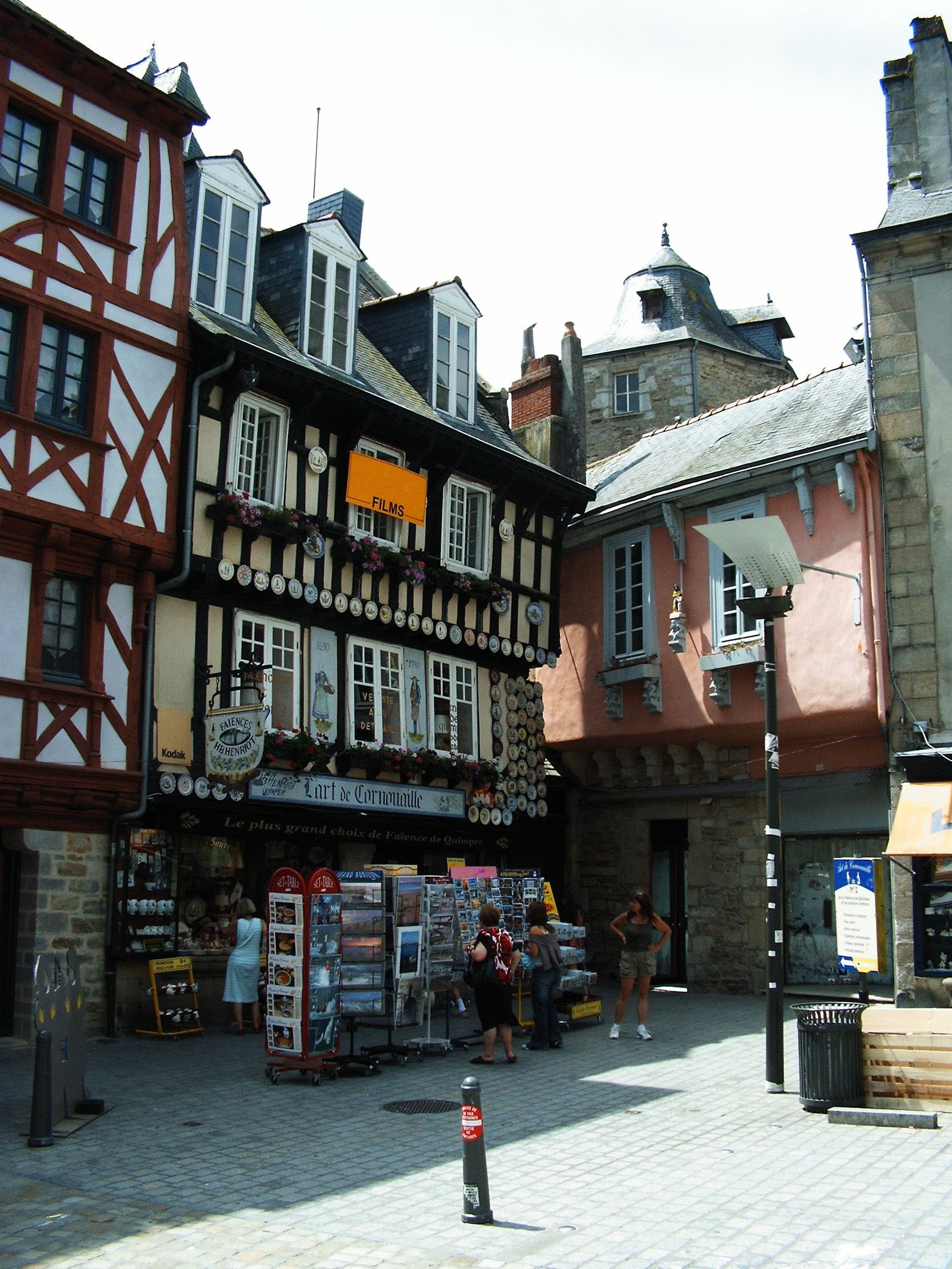 Quimper : Altstadt